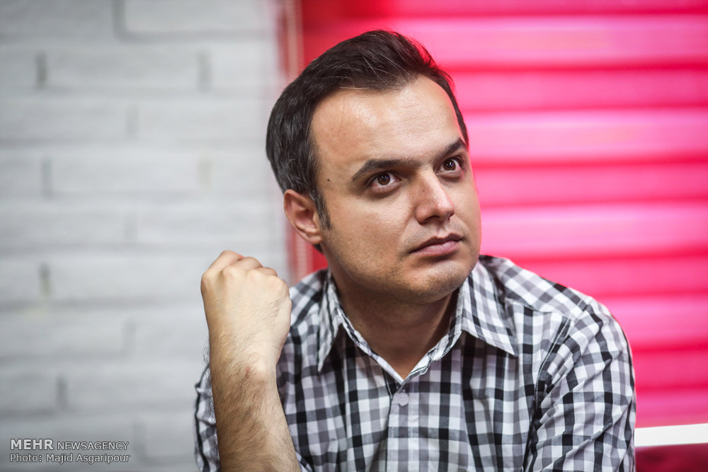 حمید محمدی